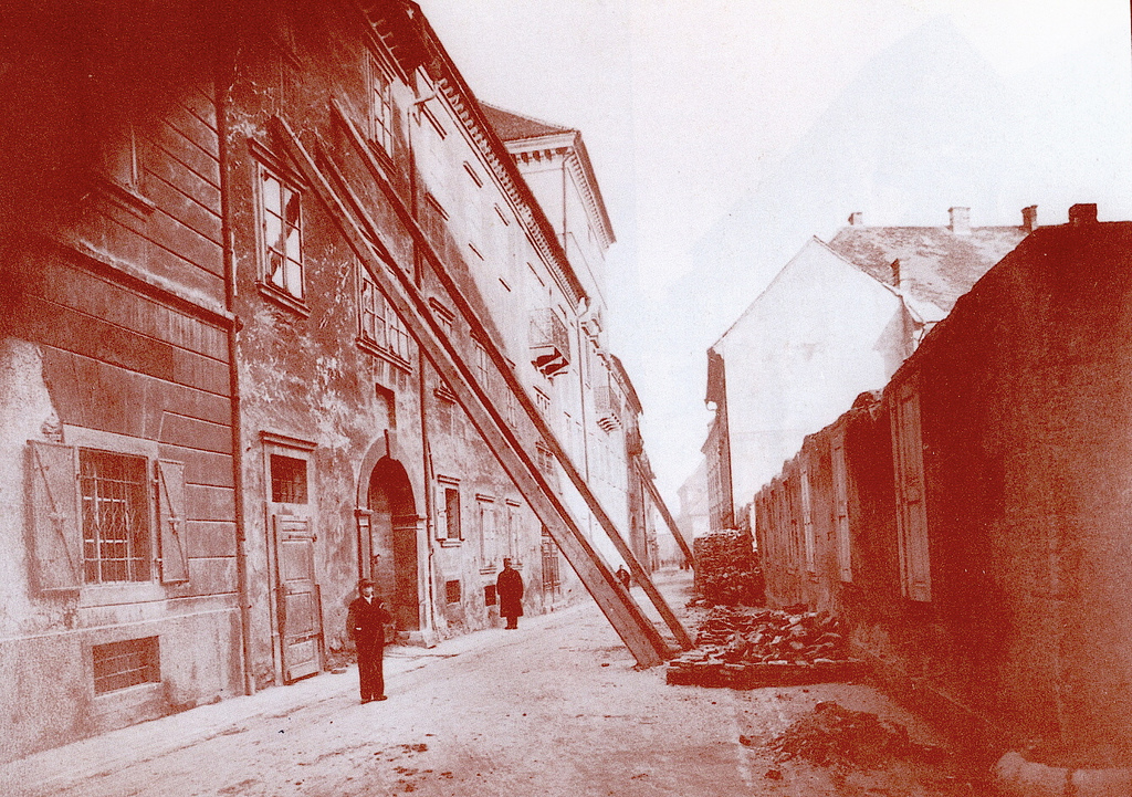 Auersperg palace, Ljubljana, in 1895.